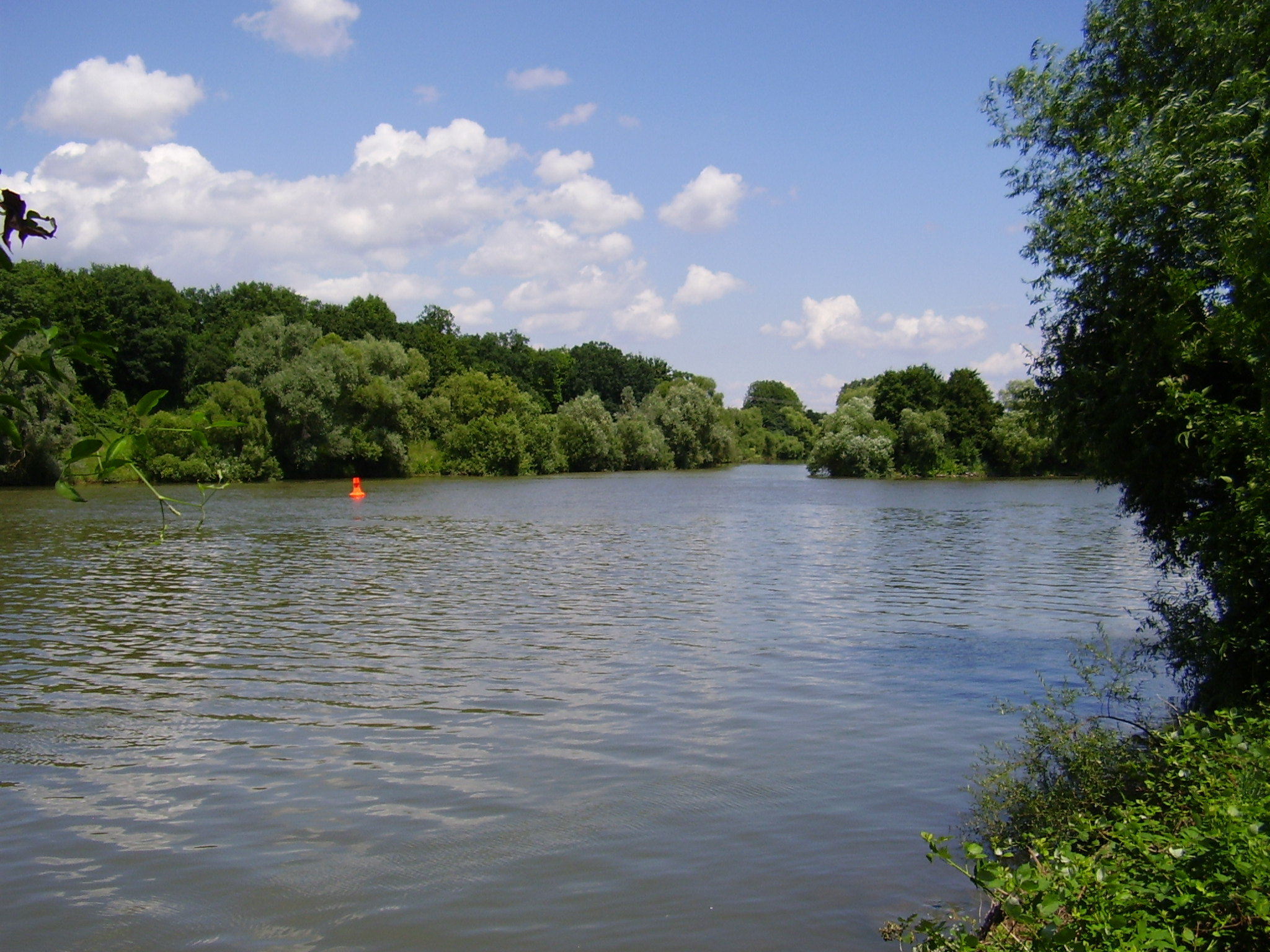 Mündung der Jagst in den Neckar.